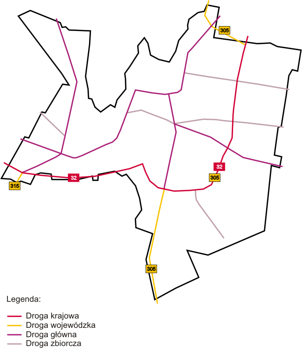 Sieć dróg miasta Wolsztyn (stan 23.11.2011)